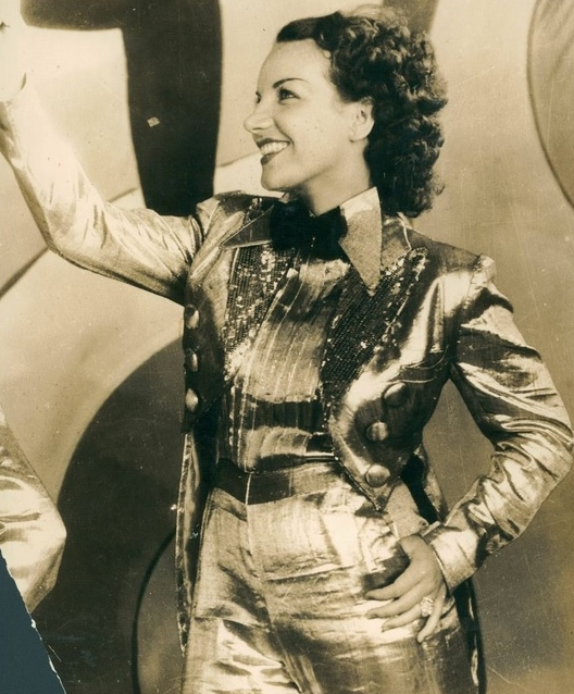 Cena do filme Alô, Alô, Carnaval (1935), dirigido por Adhemar Gonzaga.